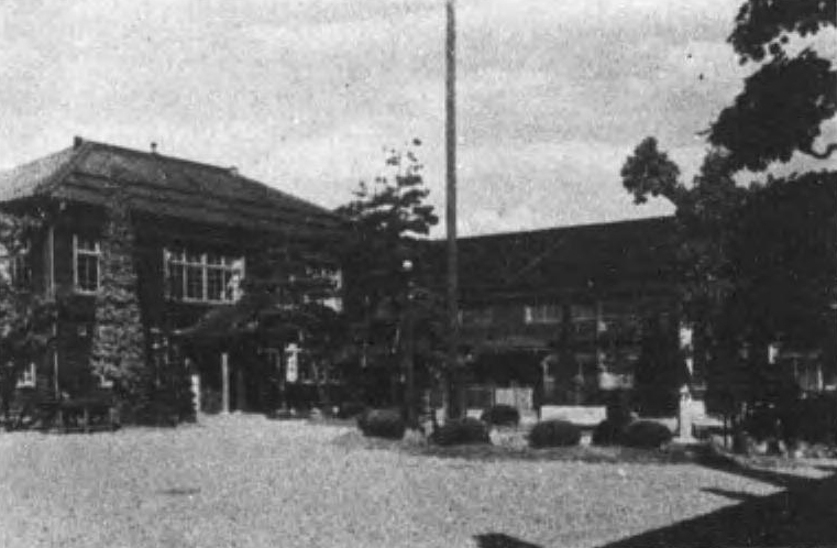 片倉製絲紡績考査課編輯『片倉製絲紡績株式會社創立二十年紀念寫真帖』片倉製絲紡績考査課、1941年3月12日。